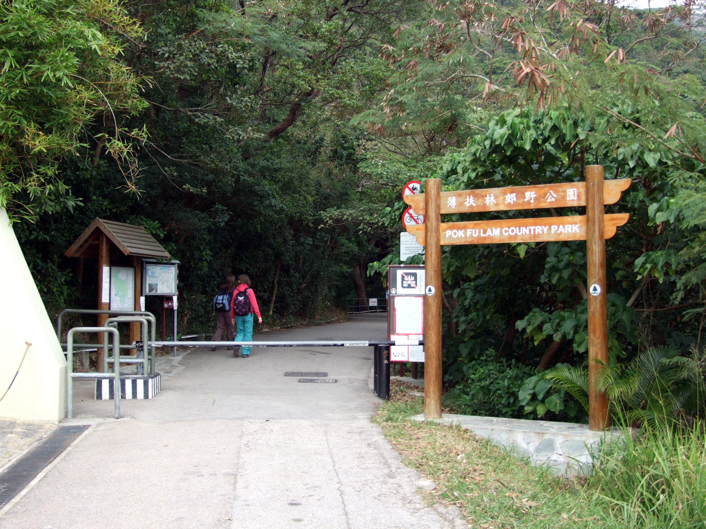 中文（香港）: 薄扶林郊野公園